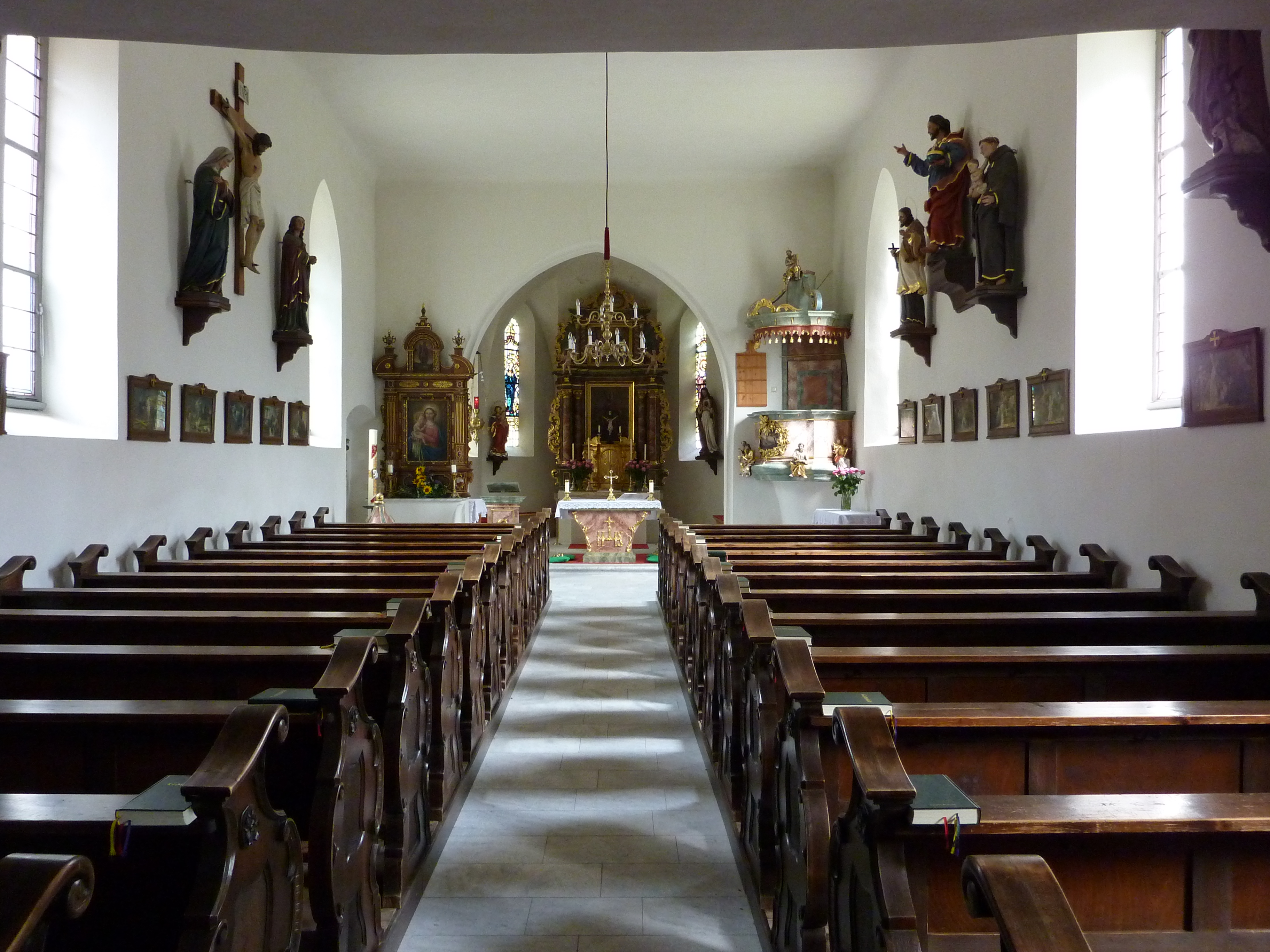 Mühldorf, Kärnten, Pfarrkirche innen